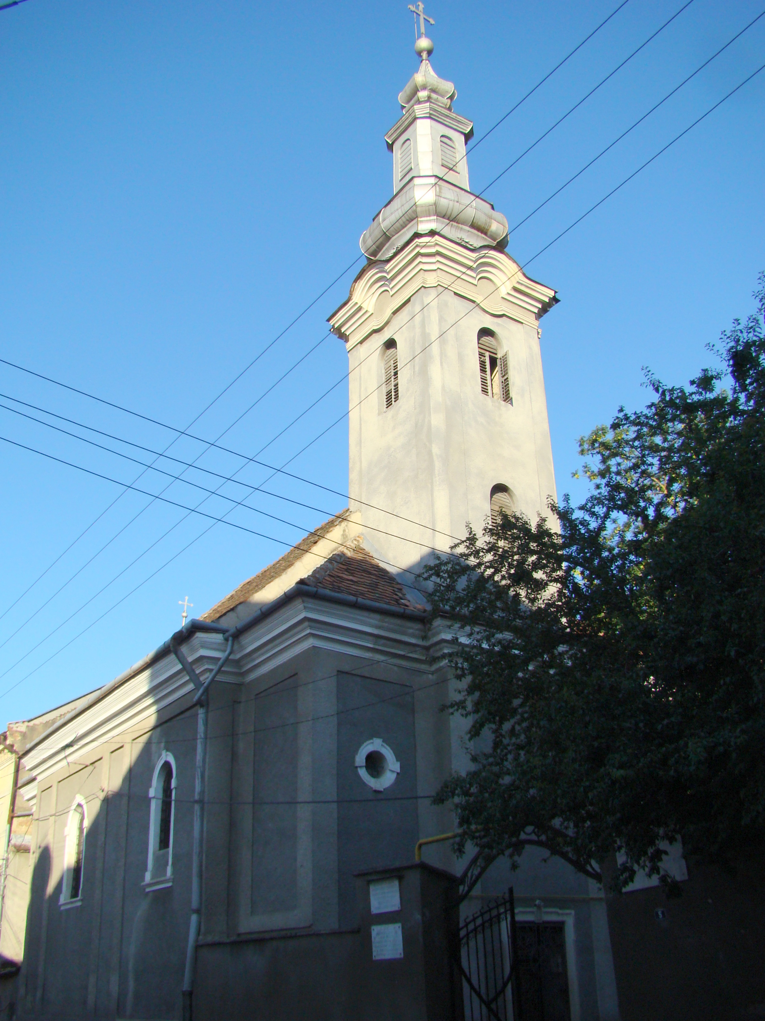 Biserica "Învierea Domnului", Bob